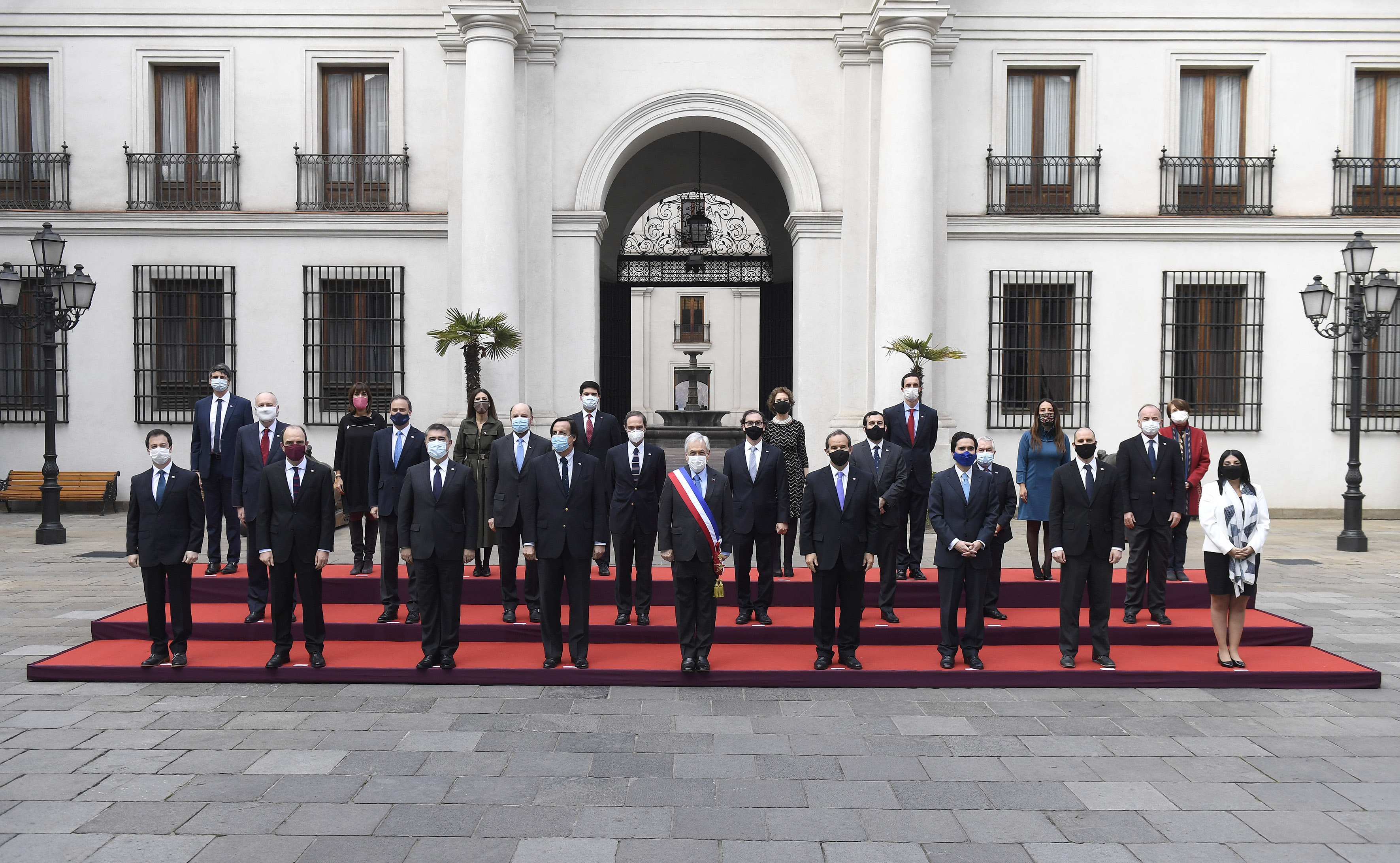 El presidente Sebastián Piñera participa junto a su gabinete ministerial en la foto oficial de la cuenta pública 2020.